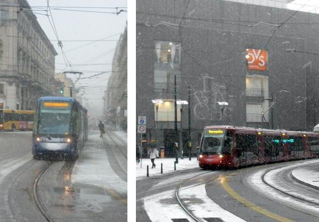 translohr a padova durante una debole nevicata